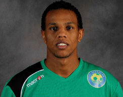 علي الخيبري لاعب نادي النصر